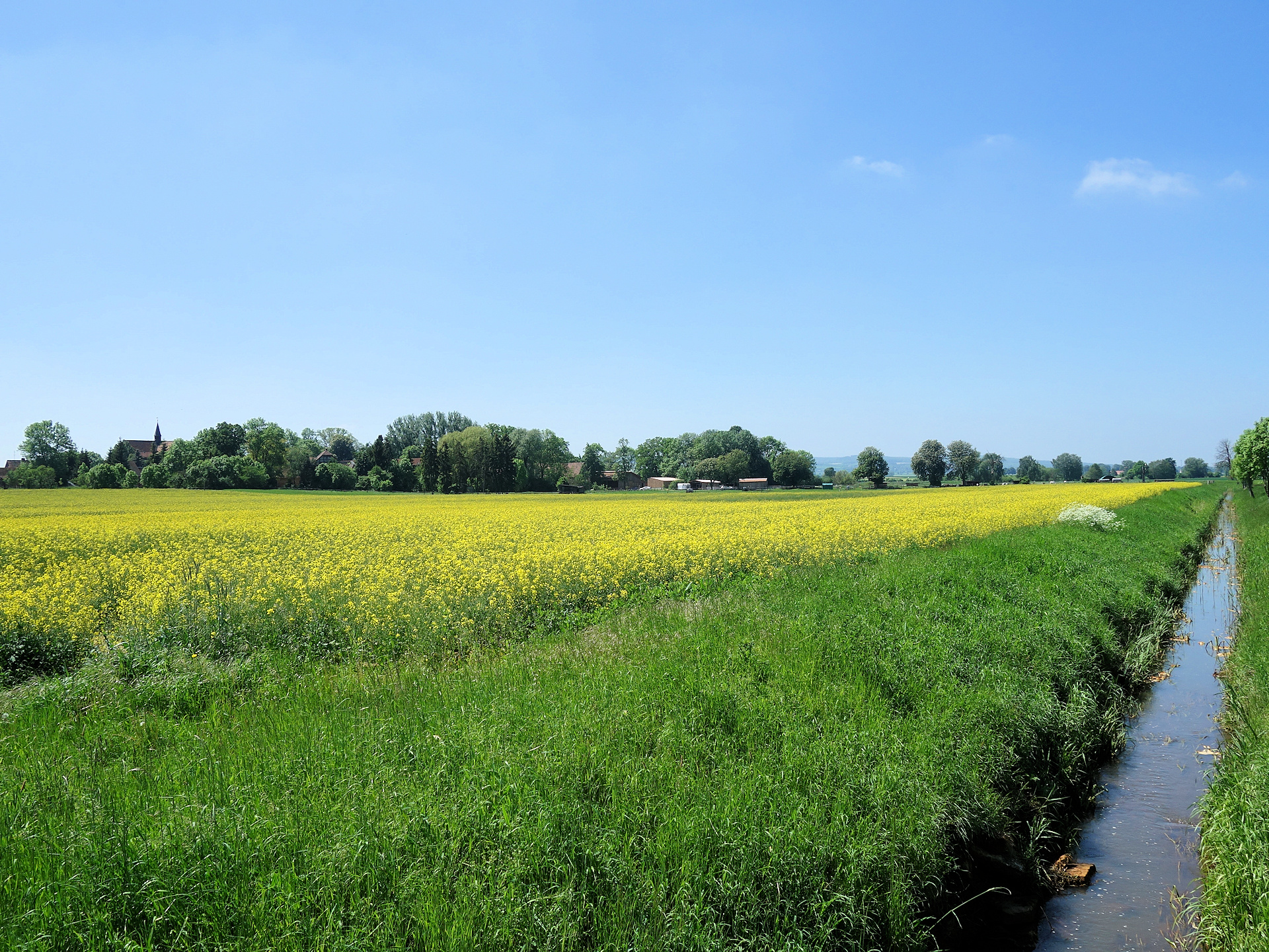 Lange Welle bzw. Mittelgraben bei Süpplingenburg, Blickrichtung Westen stromabwärts, links die Kirche.